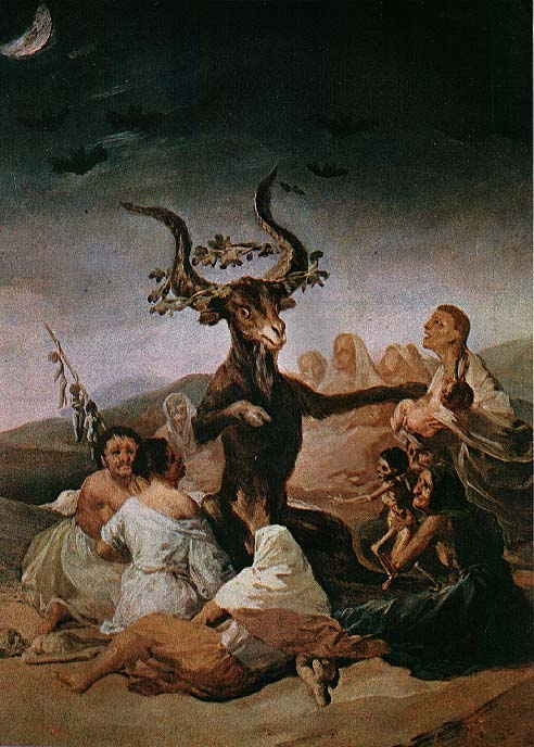 Quadro raffigurante un sabba, di Francisco Goya (1795).